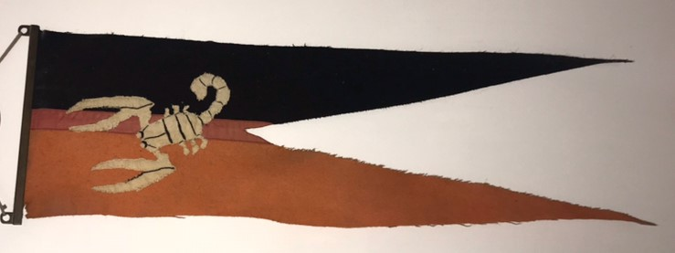 Proporczyk z czołgu Sherman najprawdopodobniej z jednostki plutonu tech.-gospodarczego. Zdjęcie własne. Orginalny proporczyk z czołgu biorącego udział w walkach o Monte Cassino.